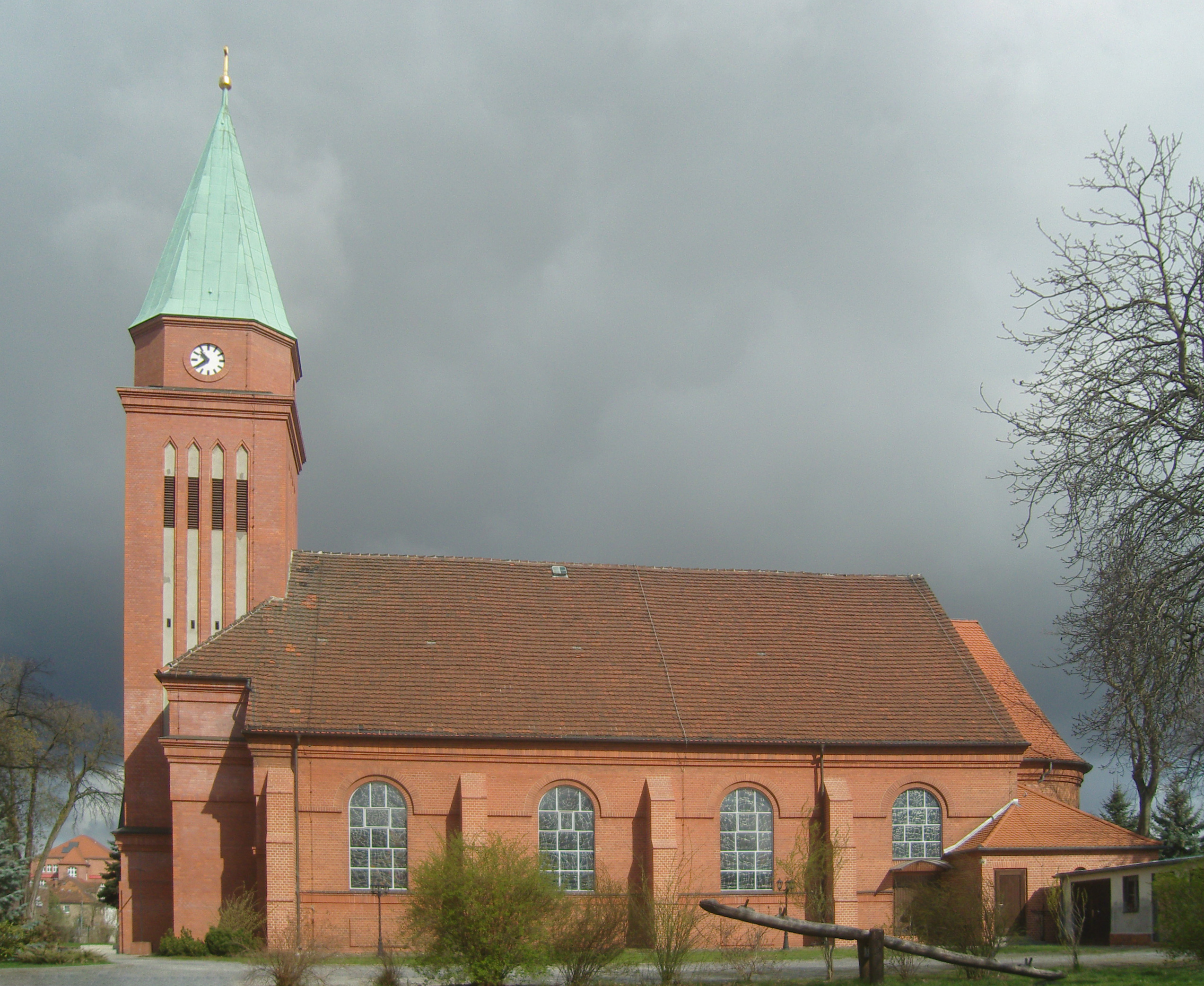 Katholische Kirche in Senftenberg; Baudenkmal